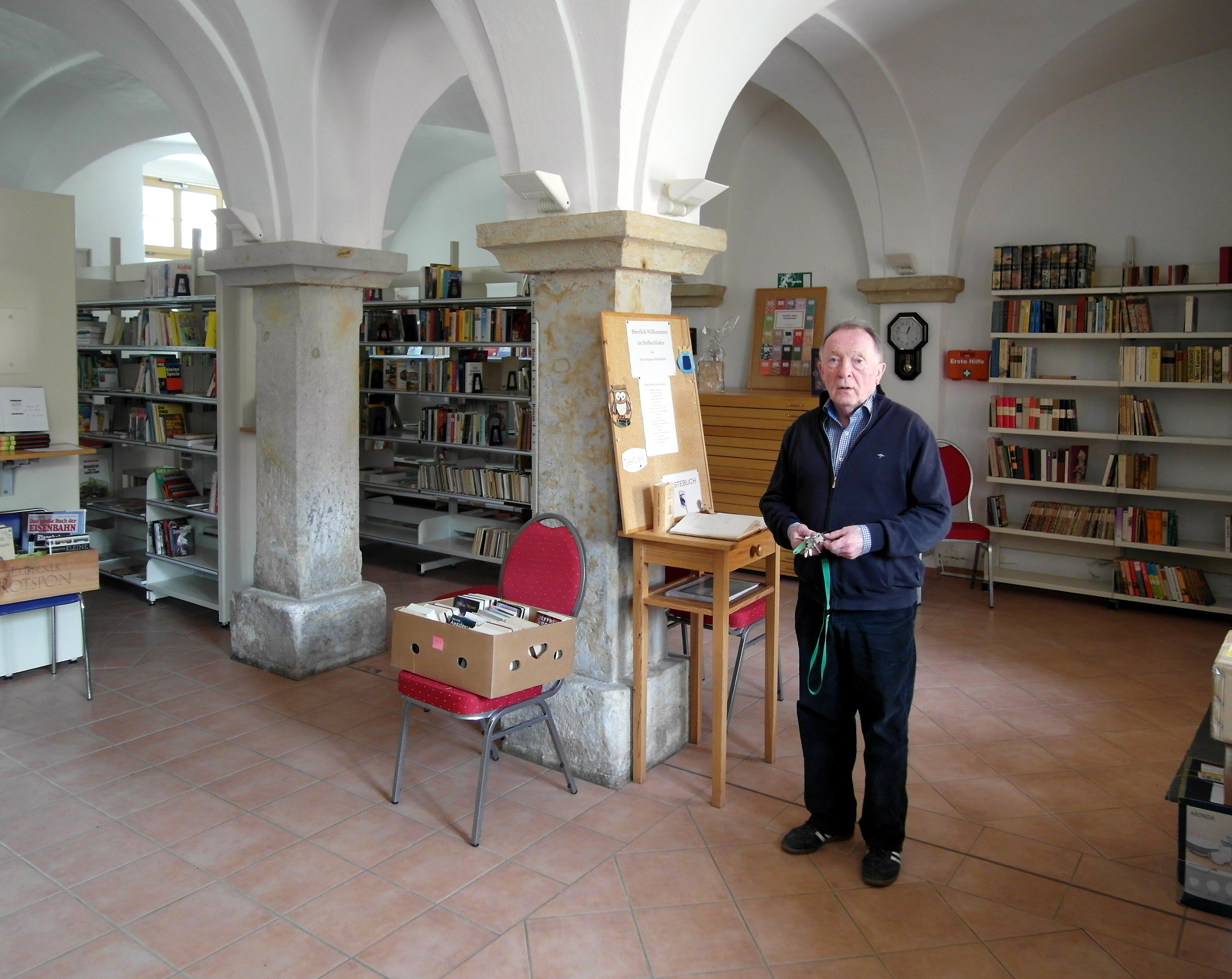 12.05.2017 01594 Staucha (Stauchitz), Thomas-Müntzer-Platz 8: Peter-Sodann-Bibliothek. Raum im einstigen Kuhstall. Der Schauspieler Peter Sodann hat die Schlüssel zum Schatz der DDR Literatur in der Hand. Er gewährt gerne Einlaß. Das Rittergut ist aus einem mittelalterlichen Benediktinerrinnenkloster entstanden, auf dessen Gelände sich Julius Alexander von Hartitzsch 1753-56 sein barockes Landschloß errichten ließ. Die Wirtschaftsgebäude des Hofes stammen von 1822/23. Nach dem Ausbau des Kuhstalls wurde 2012 die "Peter-Sodann-Bibliothek" eröffnet, die sich auch auf die nebenstehende Scheune mit dem Hoftheater erstreckt. Hier findet man eine Sammlung aller nach 1945 in der SBZ und DDR erschienen Bücher. [SAM9771.JPG]20170512355DR.JPG(c)Blobelt